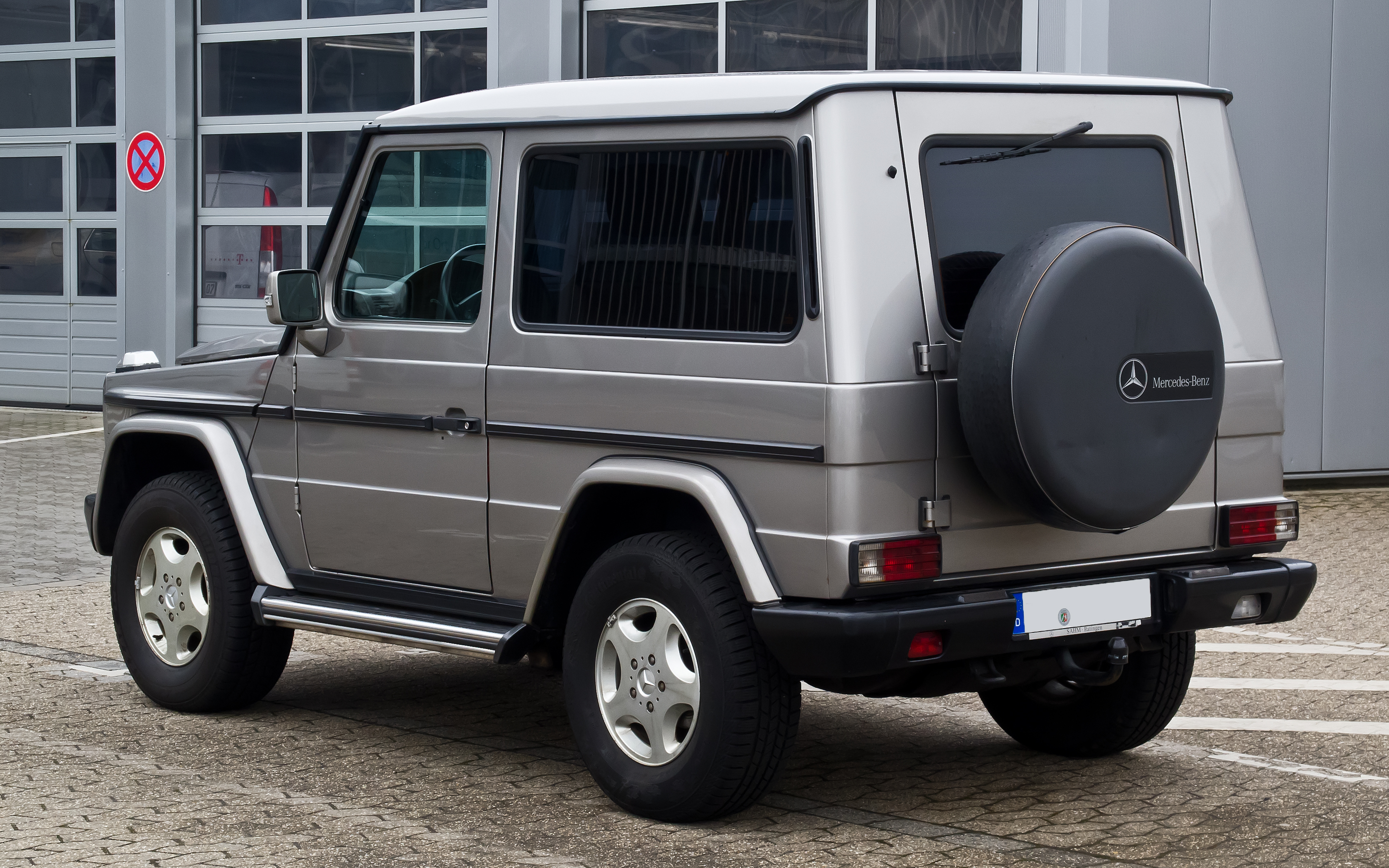 Mercedes-Benz G 270 CDI (W 463)